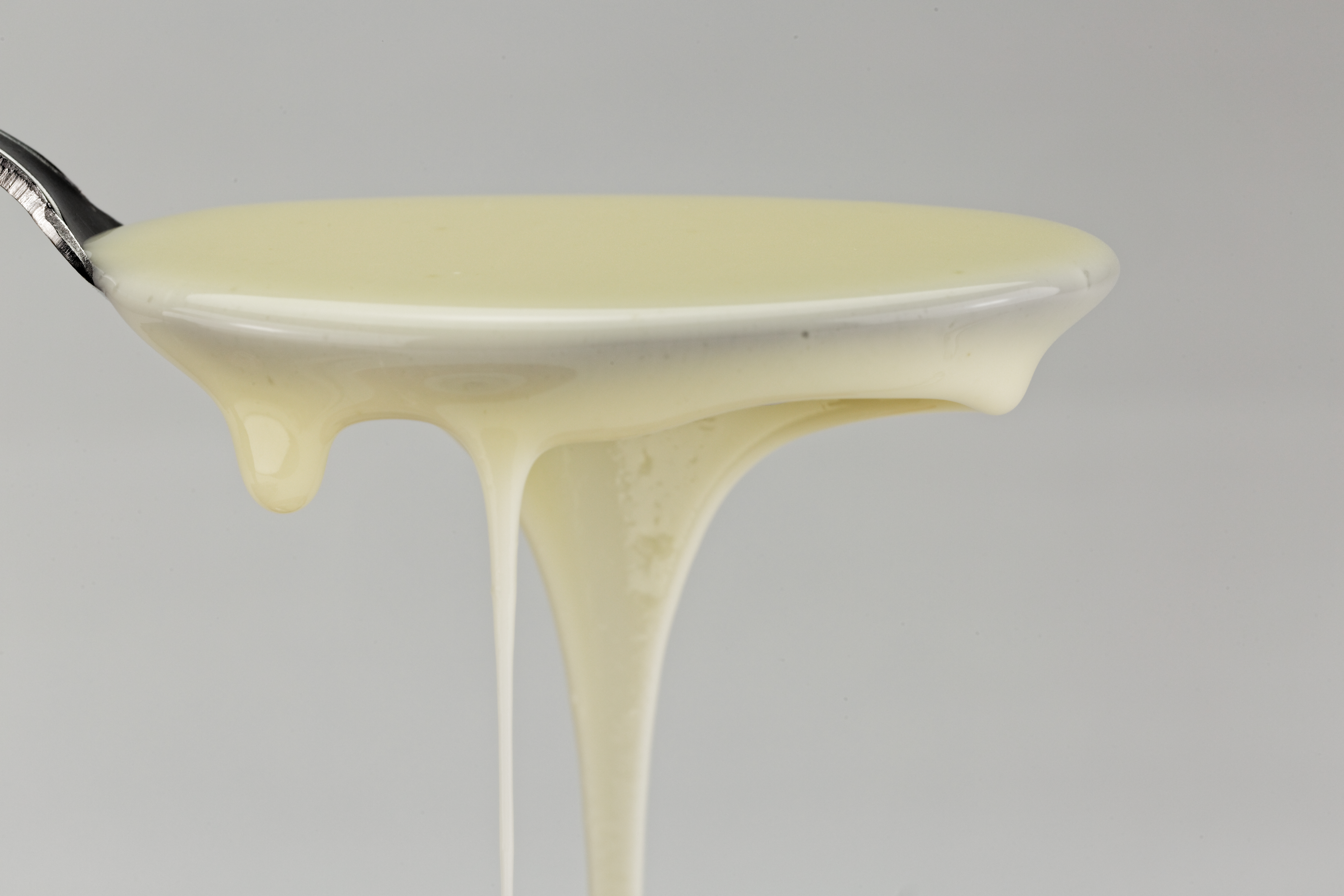 Texture de la cancoillote.